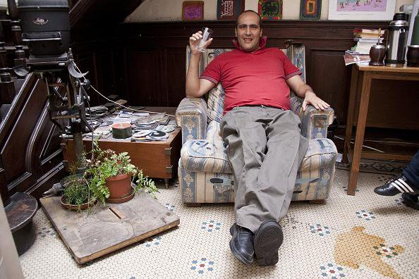 Ramiro Guzmán Zuluaga